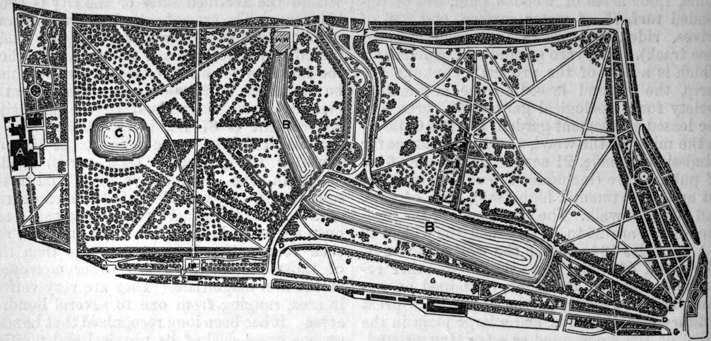 Map of Hyde Park and Kensington Gardens.